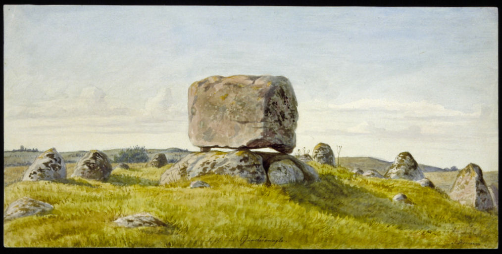 akvarel af J.Kornerup 1863. "Hødyssen", Gundsømagle sogn